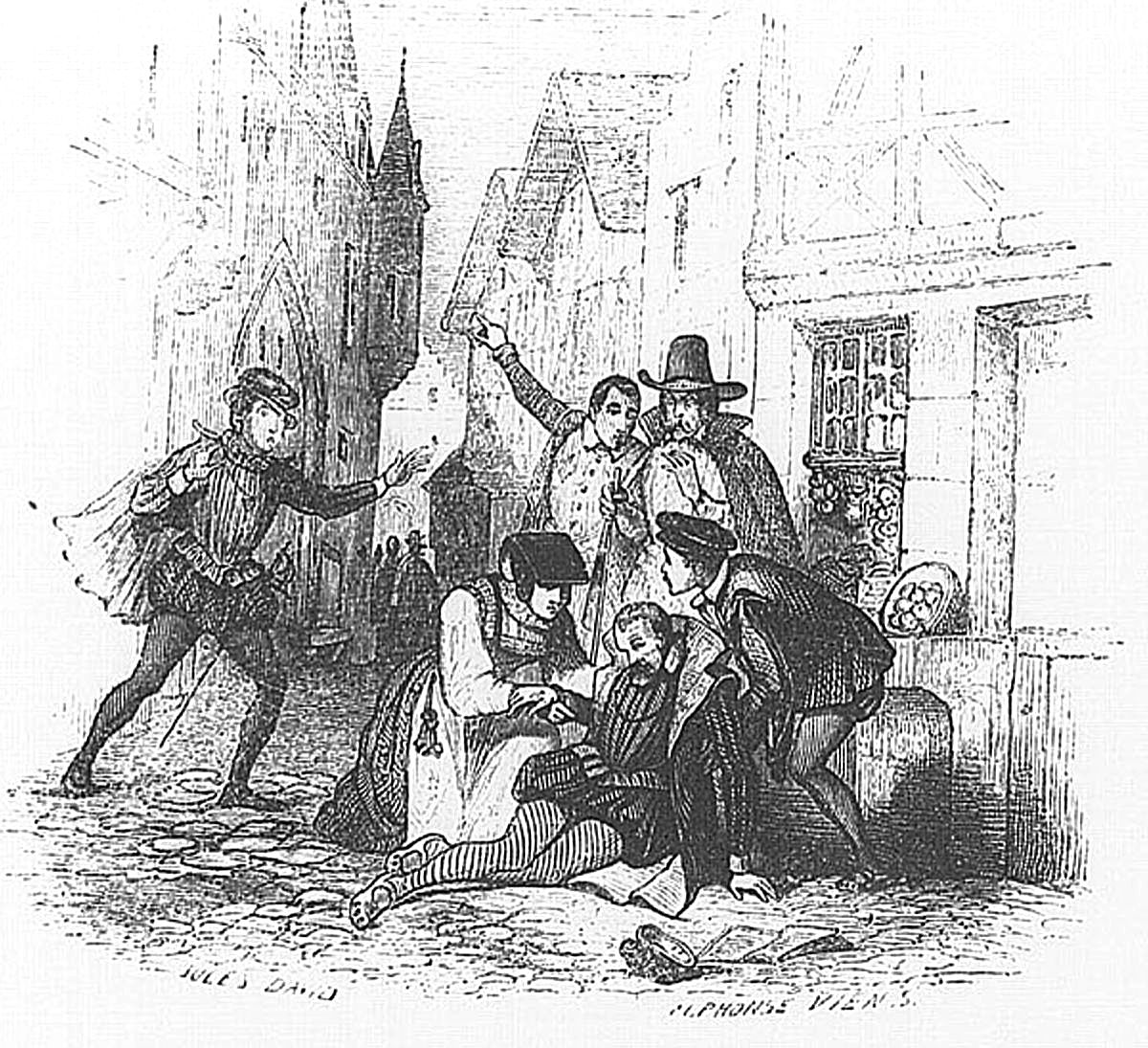 Assassinat de l'amiral de Coligny, issu de : "Les rues de Paris ancien et moderne. 1358-1848"